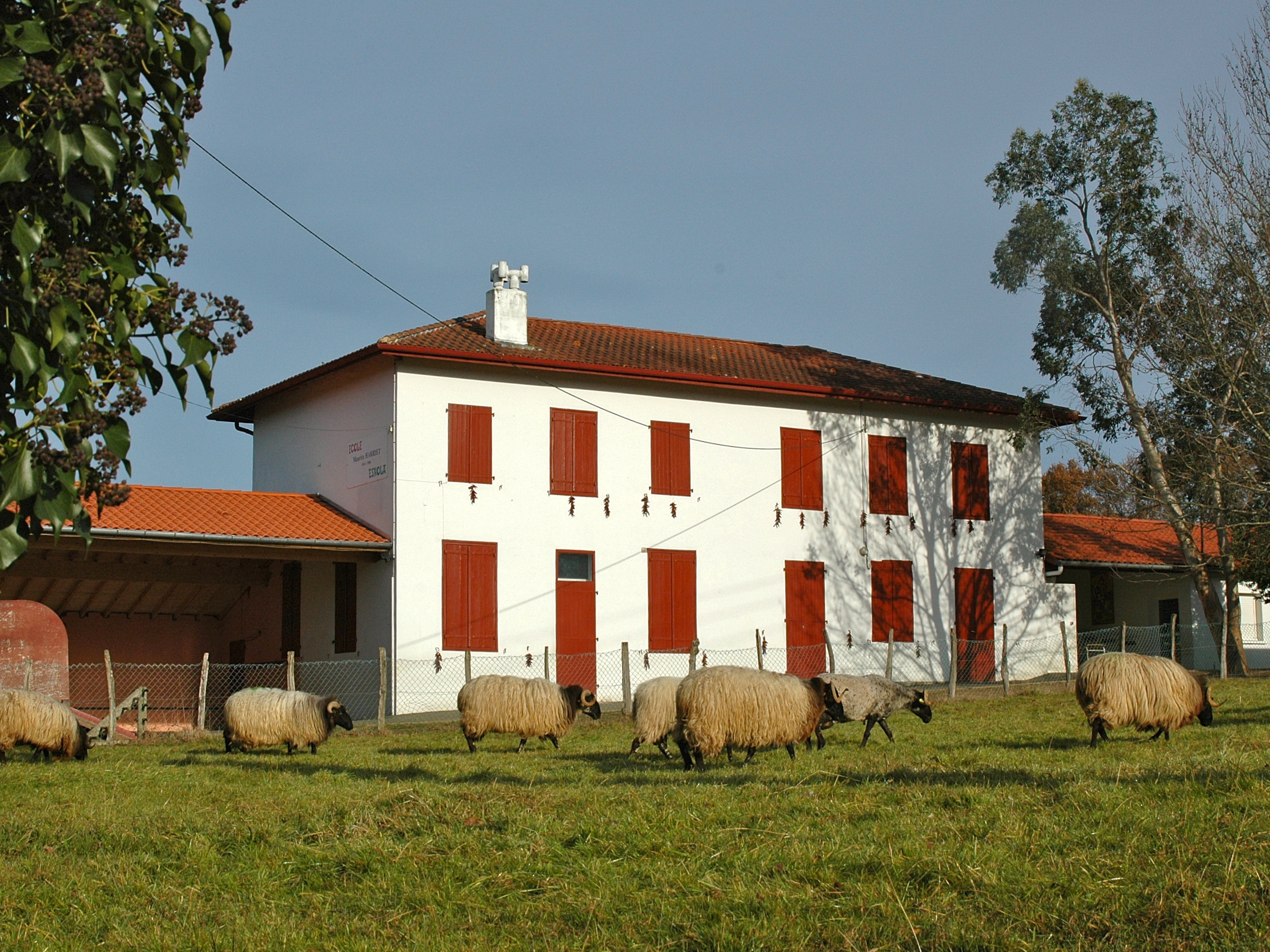 Halsou, l'école. photo prise le 31/12/06 par Harrieta171